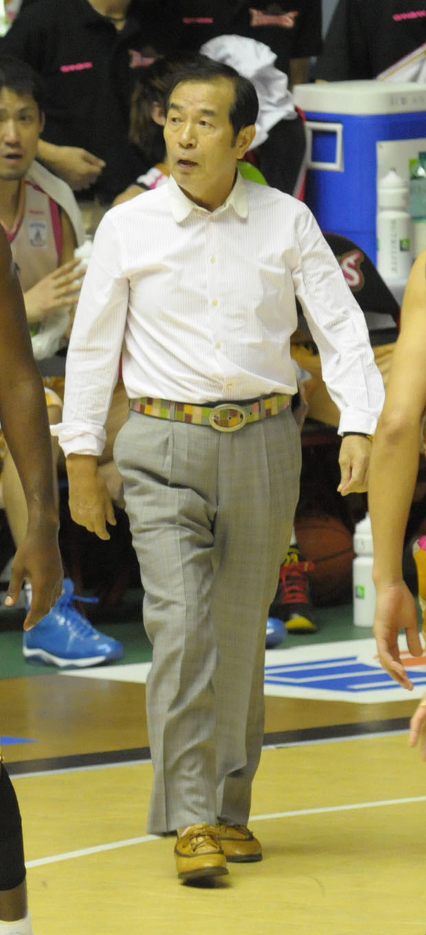 秋田ノーザンハピネッツ、ケニー・テイラー選手。秋田県立体育館で。